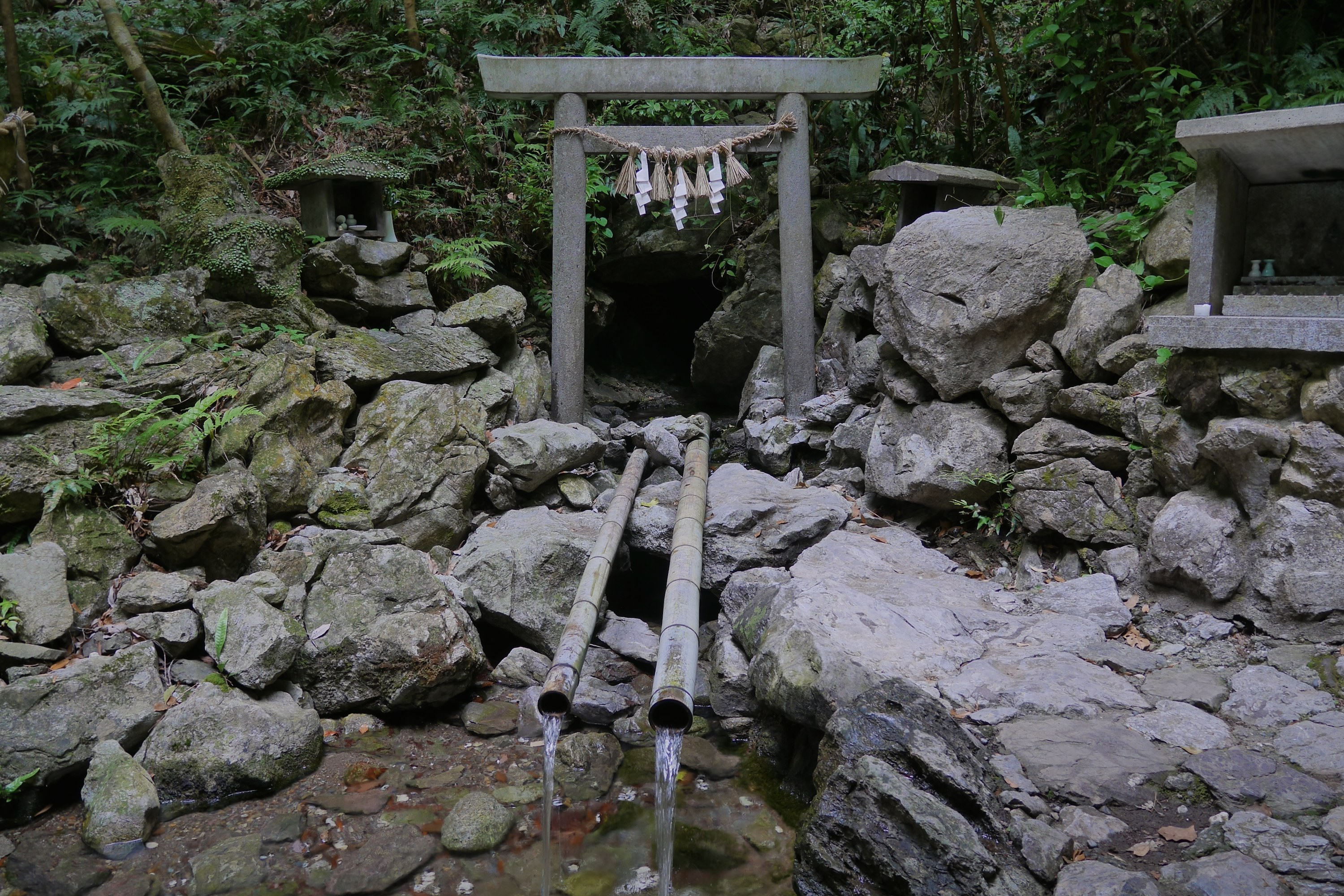 日本の三重県志摩市にある鍾乳洞、天岩戸（恵利原の水穴）。